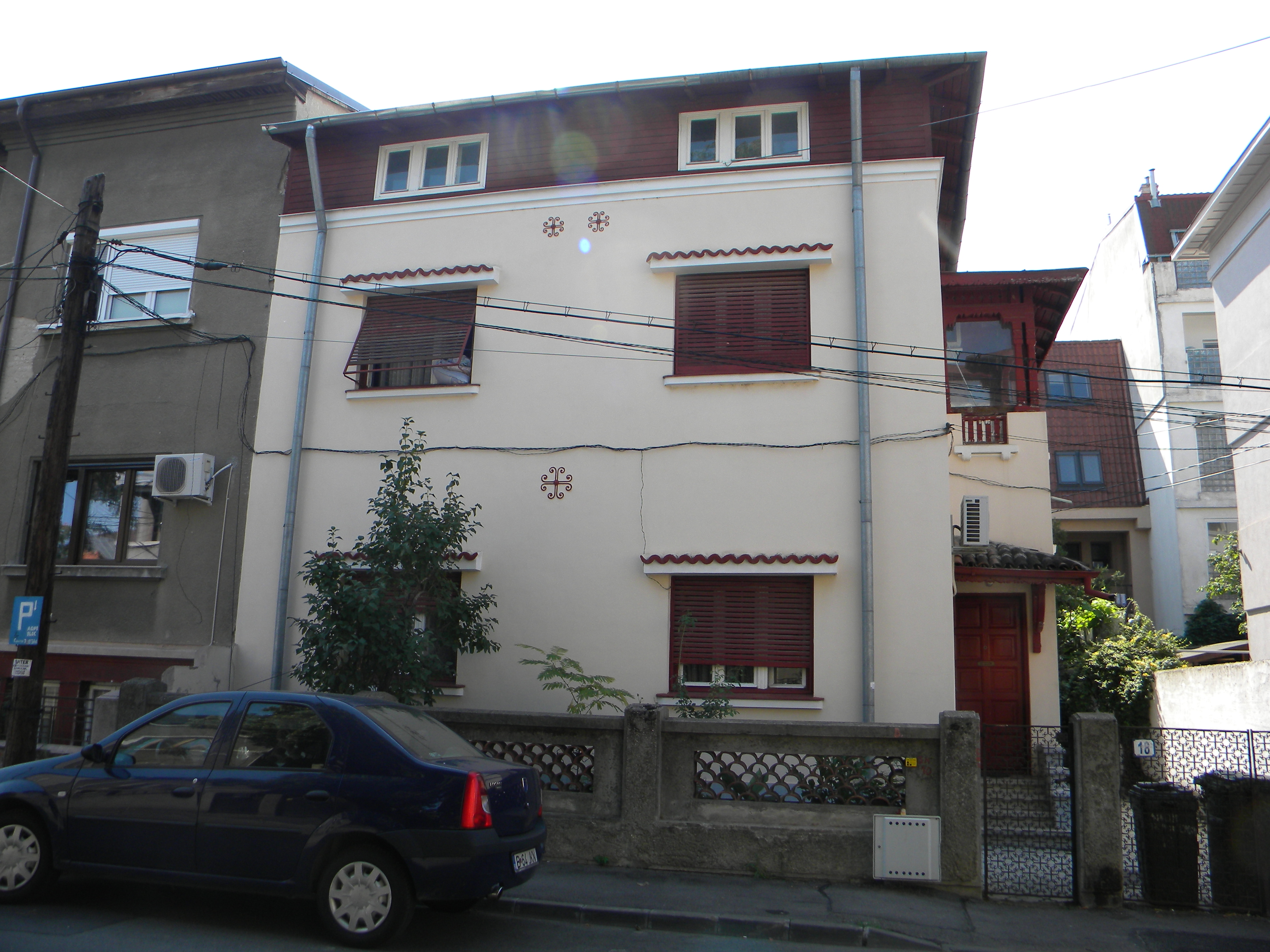 Bucuresti, Romania, Imobilul nr. 18 de pe Str. Naum Ramniceanu; B-II-m-B-19537